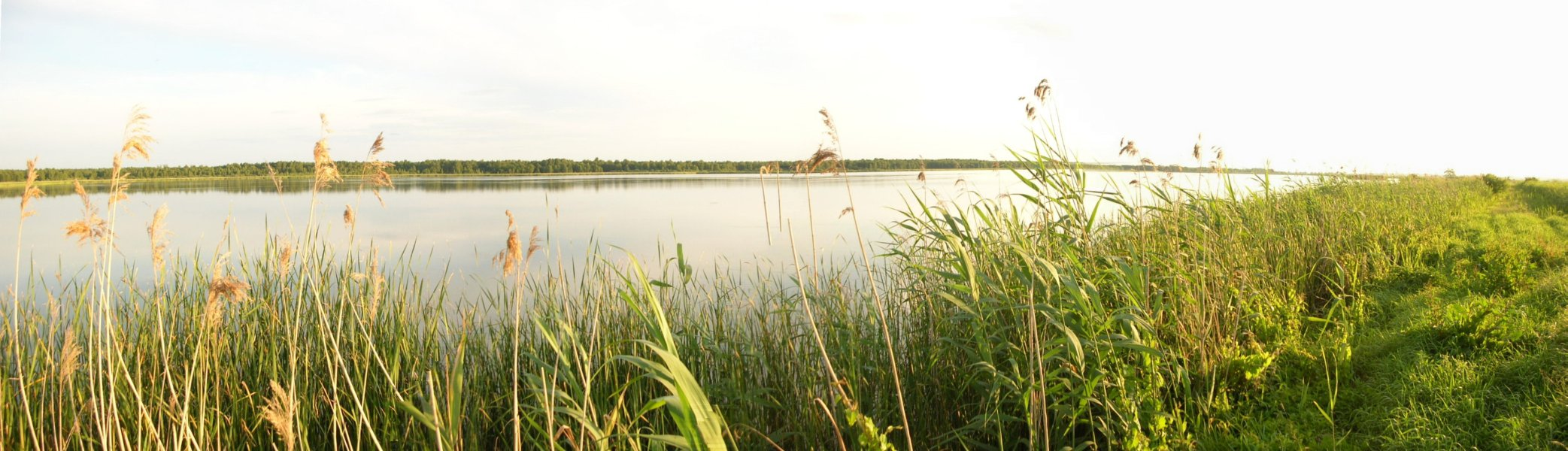 Staw Kardynalski w pradolinie Toruńsko-Eberswaldzkiej, między Bydgoszczą, a Nakłem, w pobliżu rezerwatu przyrody Łąki Ślesińskie